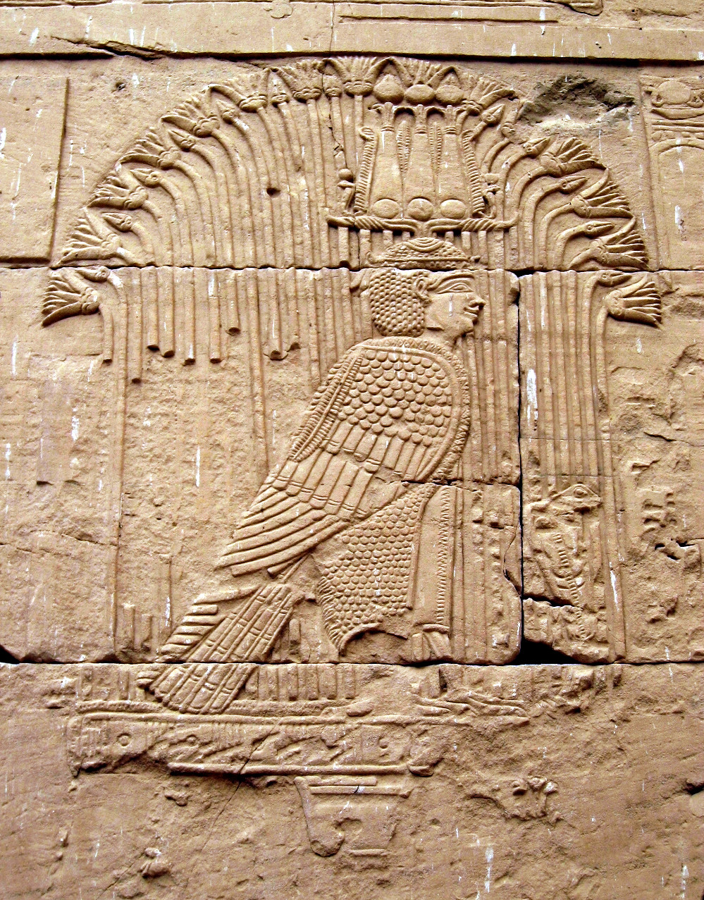 Mandulis in Kalabsha